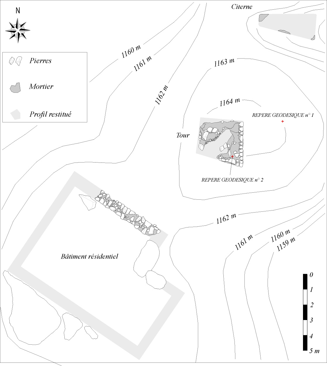 Planimétrie chateau cuciurpula